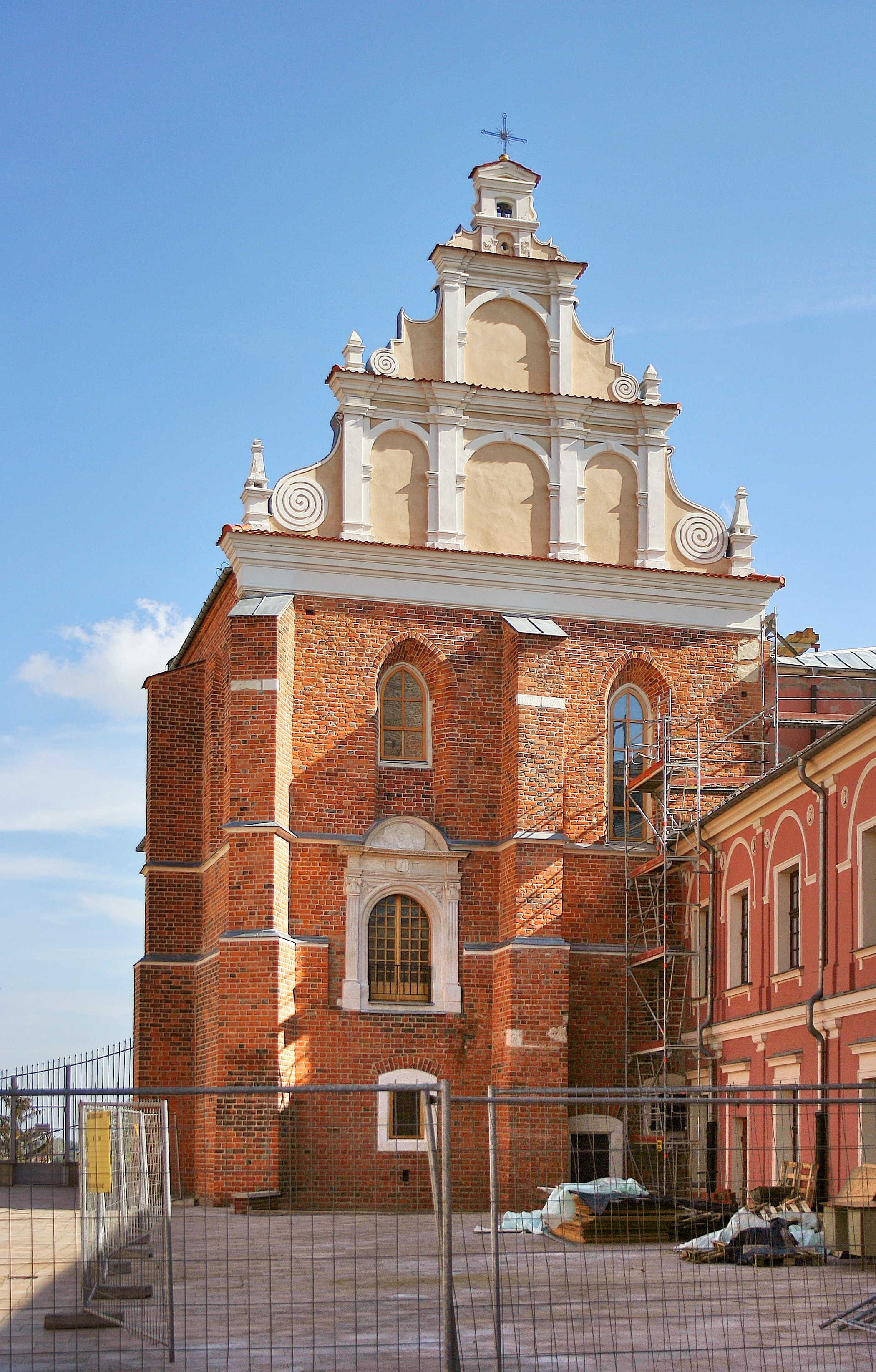 Lublin, ul. Zamkowa 9 - Kaplica Trójcy Świętej w zespole zamkowym (zabytek nr A/3 z 24.05.1956)